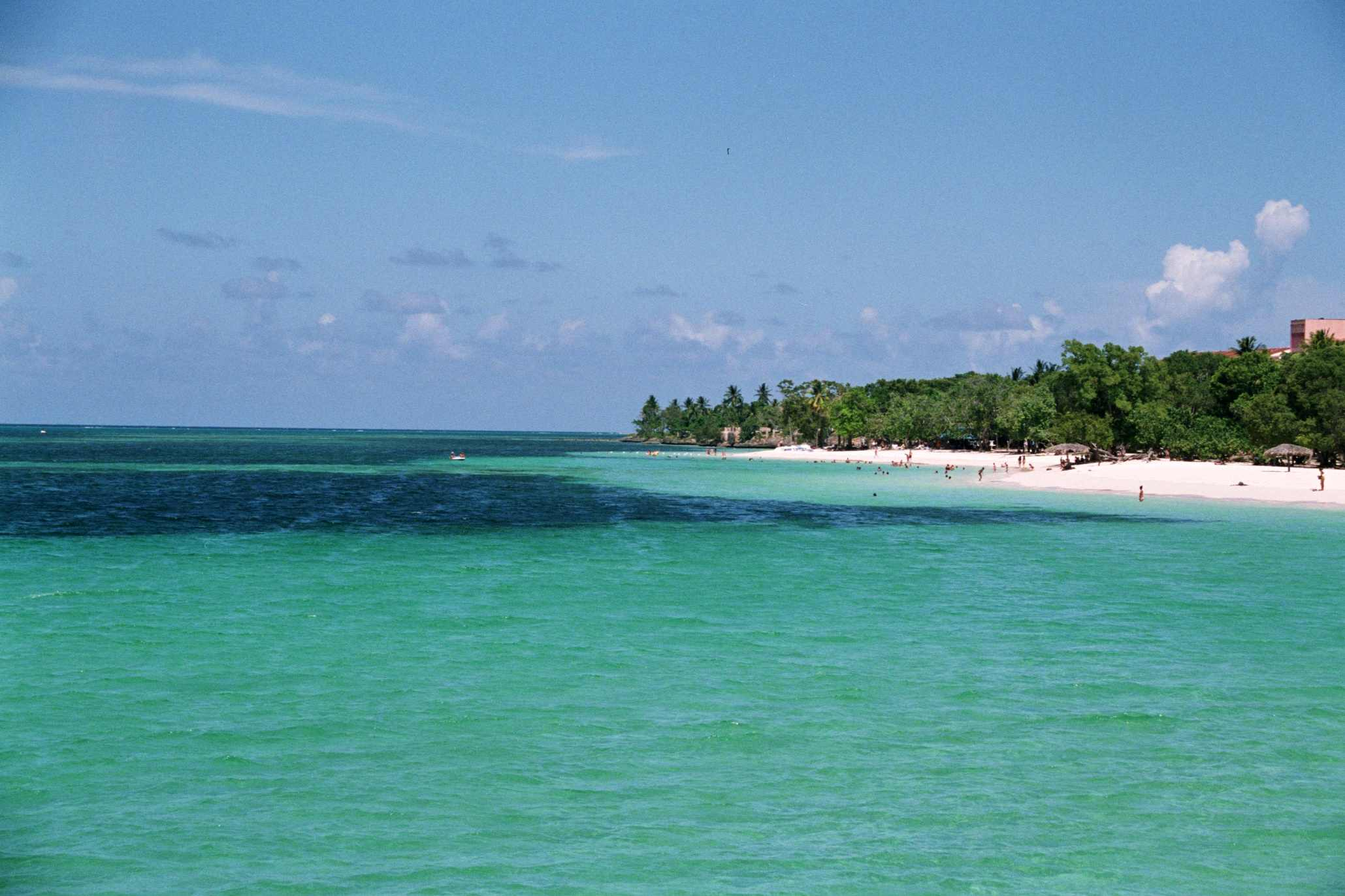 beach in Varadero